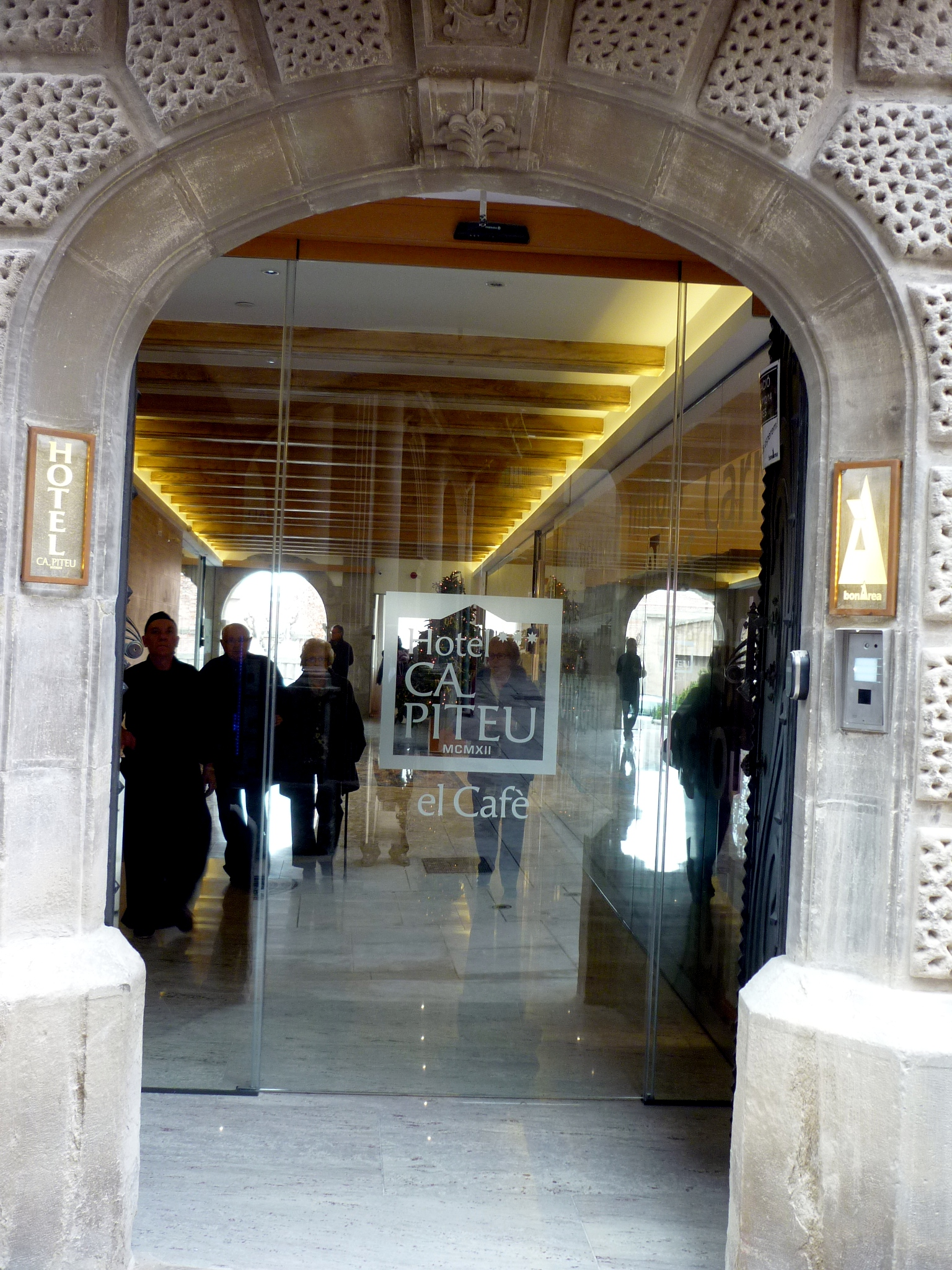 Cal Piteu (Guissona): Portada d'entrada